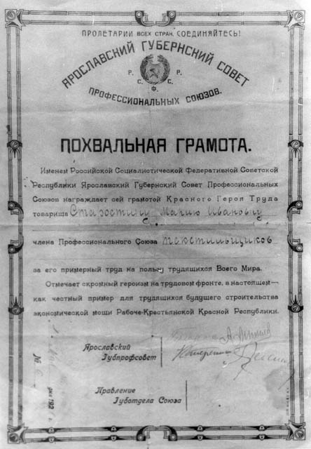 Похвальная грамота Красному Герою Труда, вручавшаяся Ярославским губернским советом профессиональных союзов.